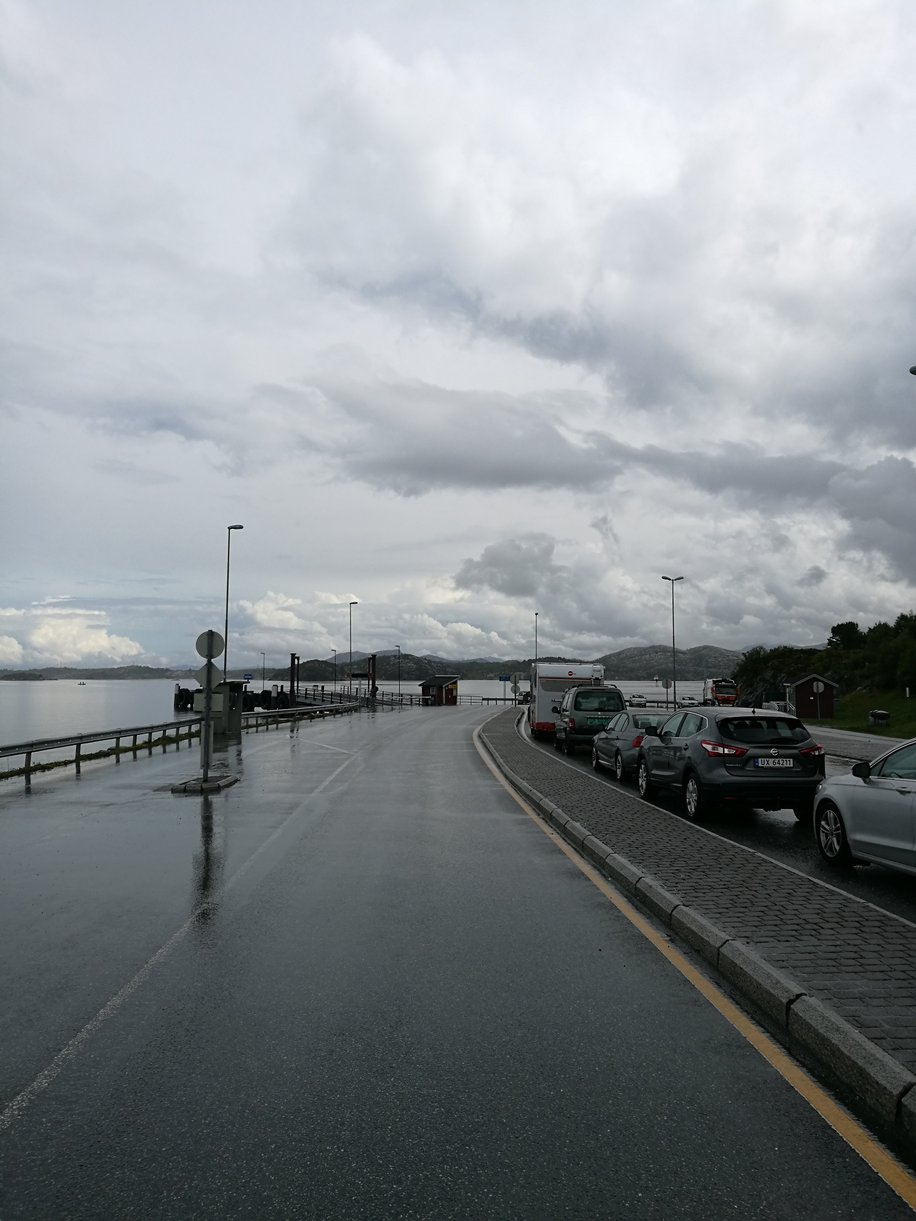 Sandvika ferjekai på Tustna i sambandet Edøya–Sandvika på Fylkesvei 669.